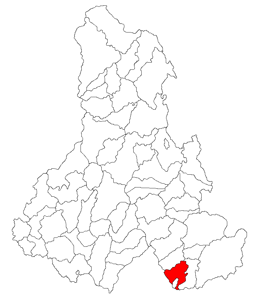 Categorie:Hărţi ale judeţului Harghita Contents 1 Licensing 2 Sursă 3 Licensing 4 Original upload log Licensing Sursă ro::Imagine:Harta_jud_Harghita.png